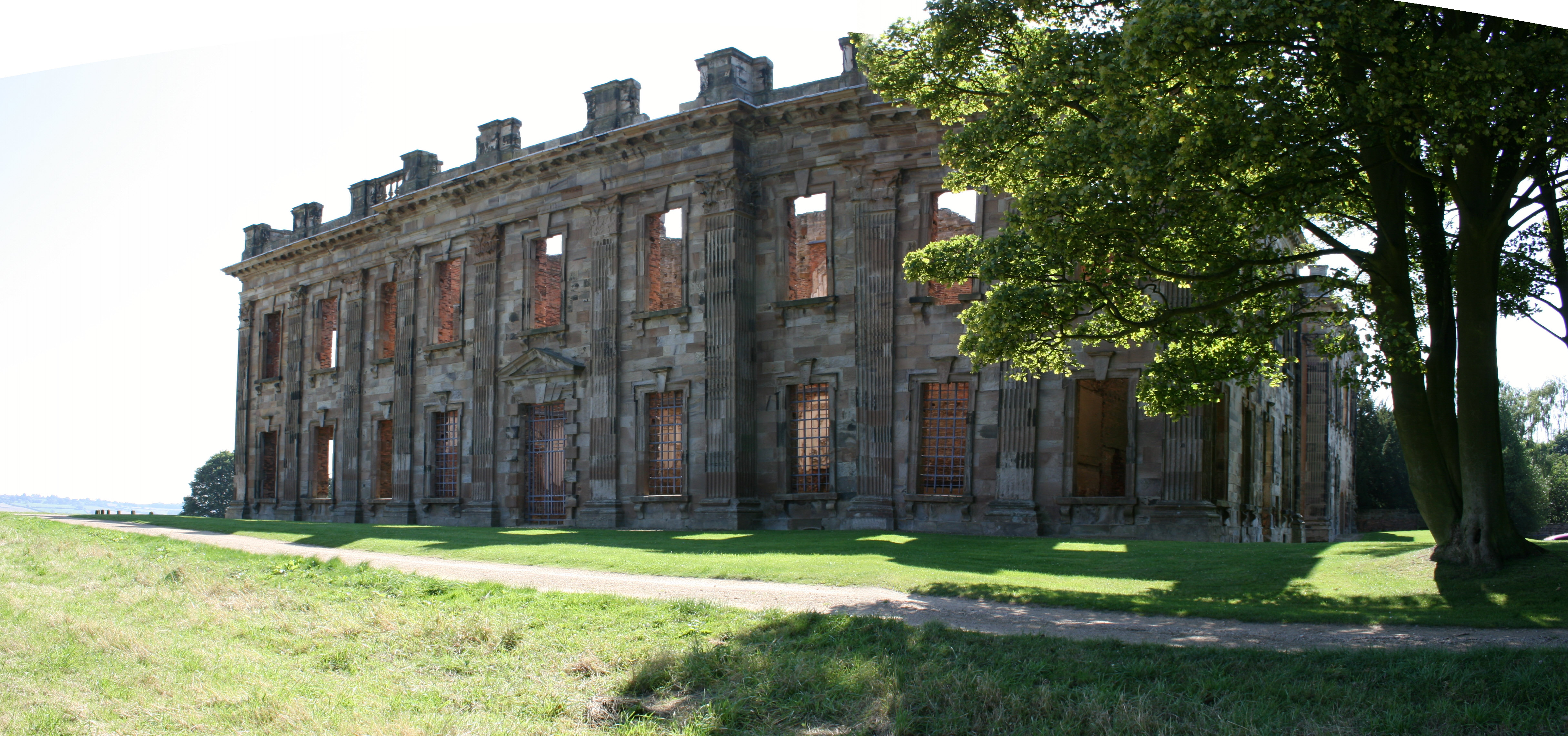 sutton scarsdale hall